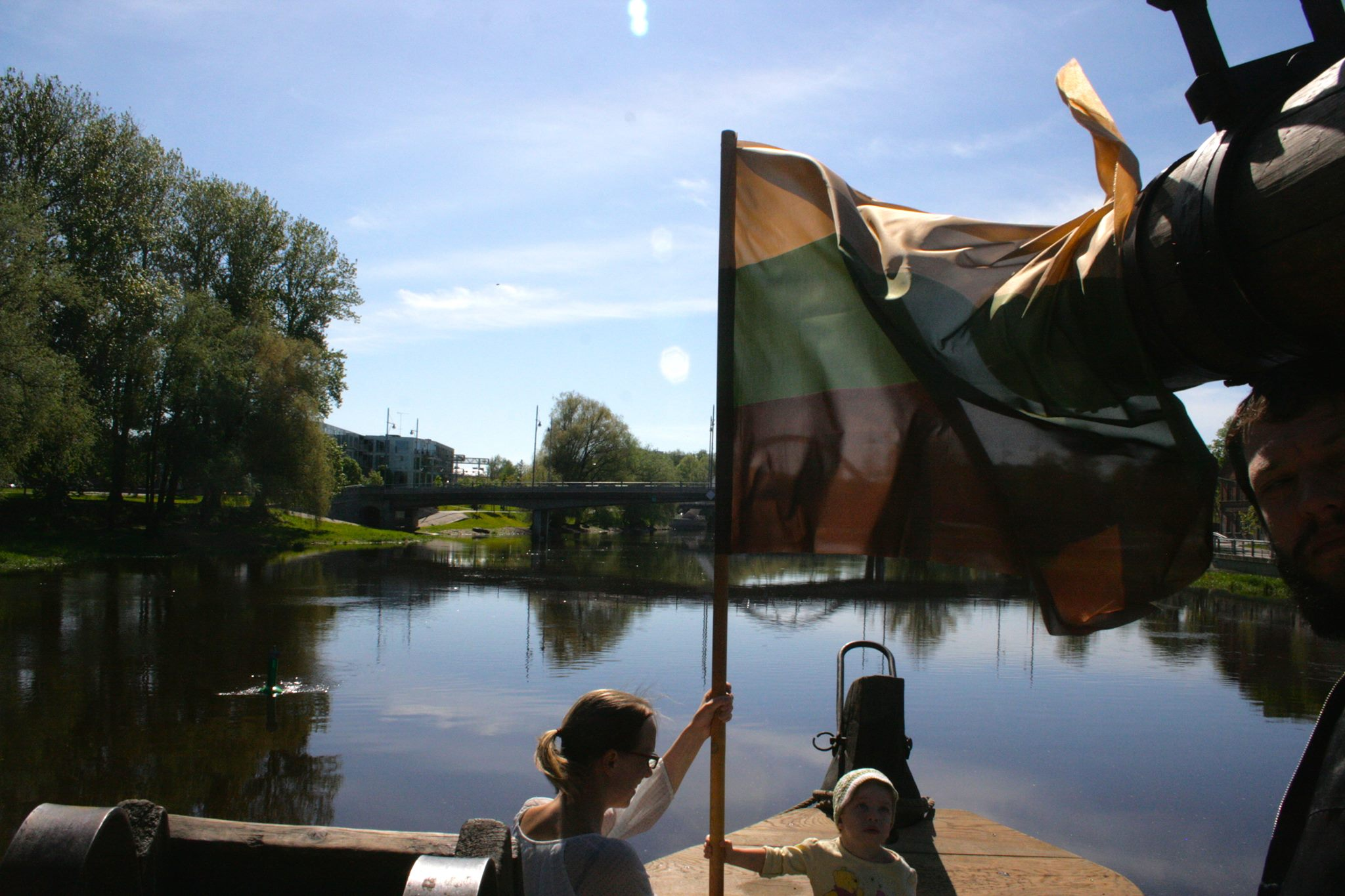 Supilinna lipp 2014. aastal lodi Jõmmu ninas teel Karlova linnaosa päevadele.